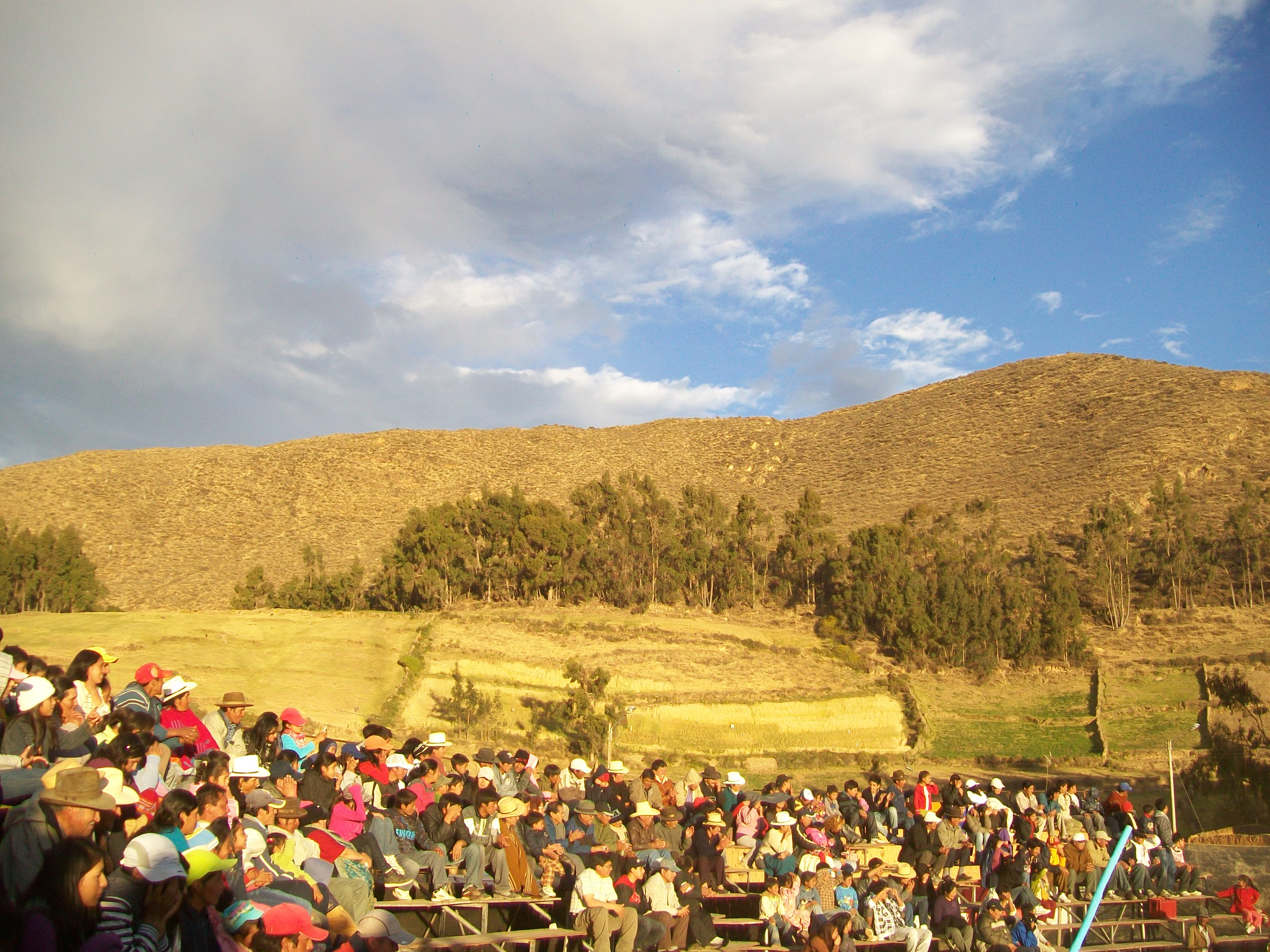 Corrida en Pilluc el 04 Agosto, Ocros,Perú. País: Perú Fotógrafo:© Edgar Amador Espinoza Montesinos